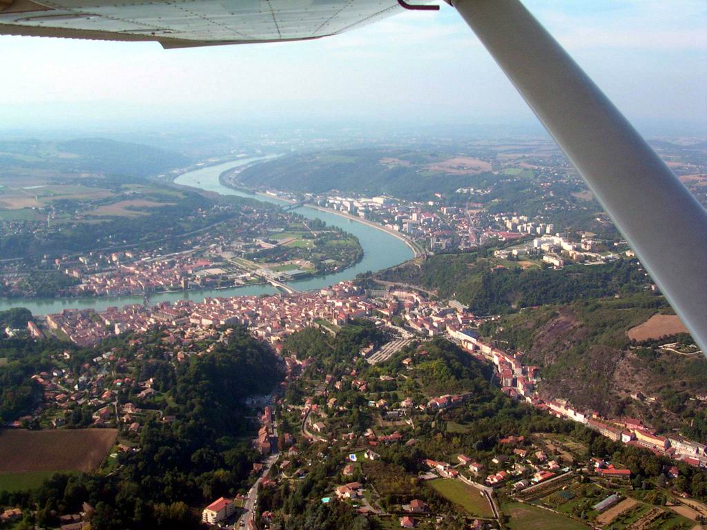 Vienne